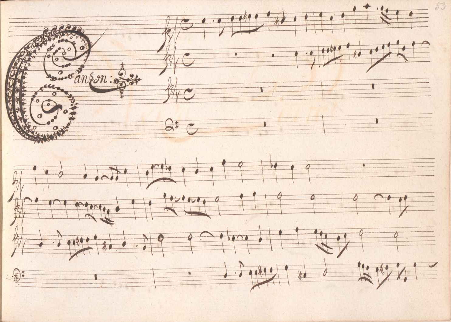 Page manuscrite autographe du Libro secondo di toccate, fantasie, canzone... (1649). Début de la canzone FbWV 101.